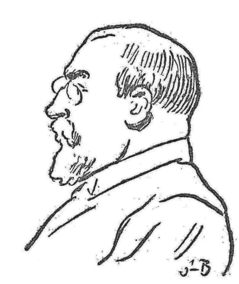 "M. de Castro".